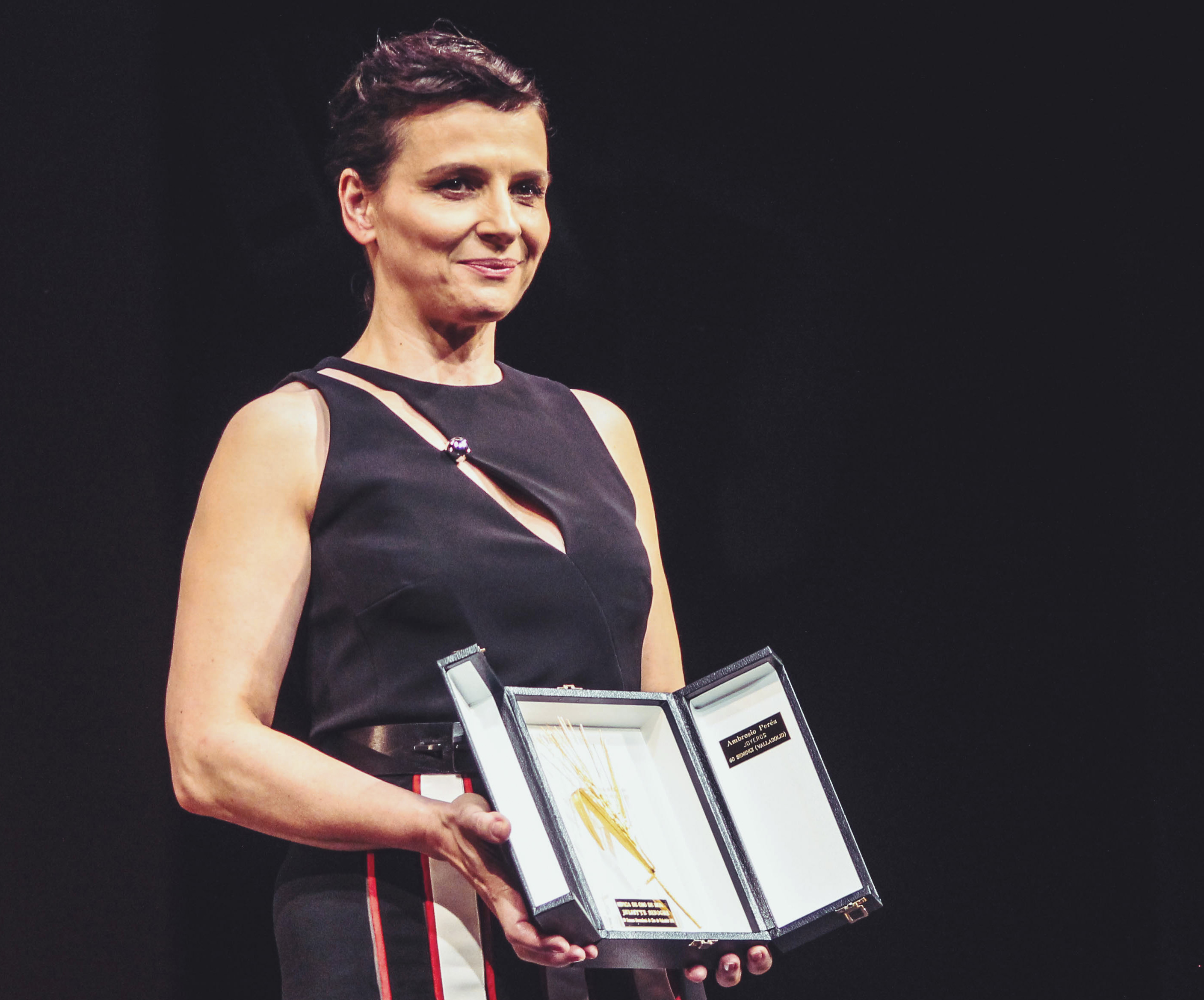 Juliette Binoche con su espiga de honor de la Seminci en 2015.